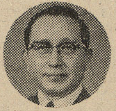 대한민국의 정치인